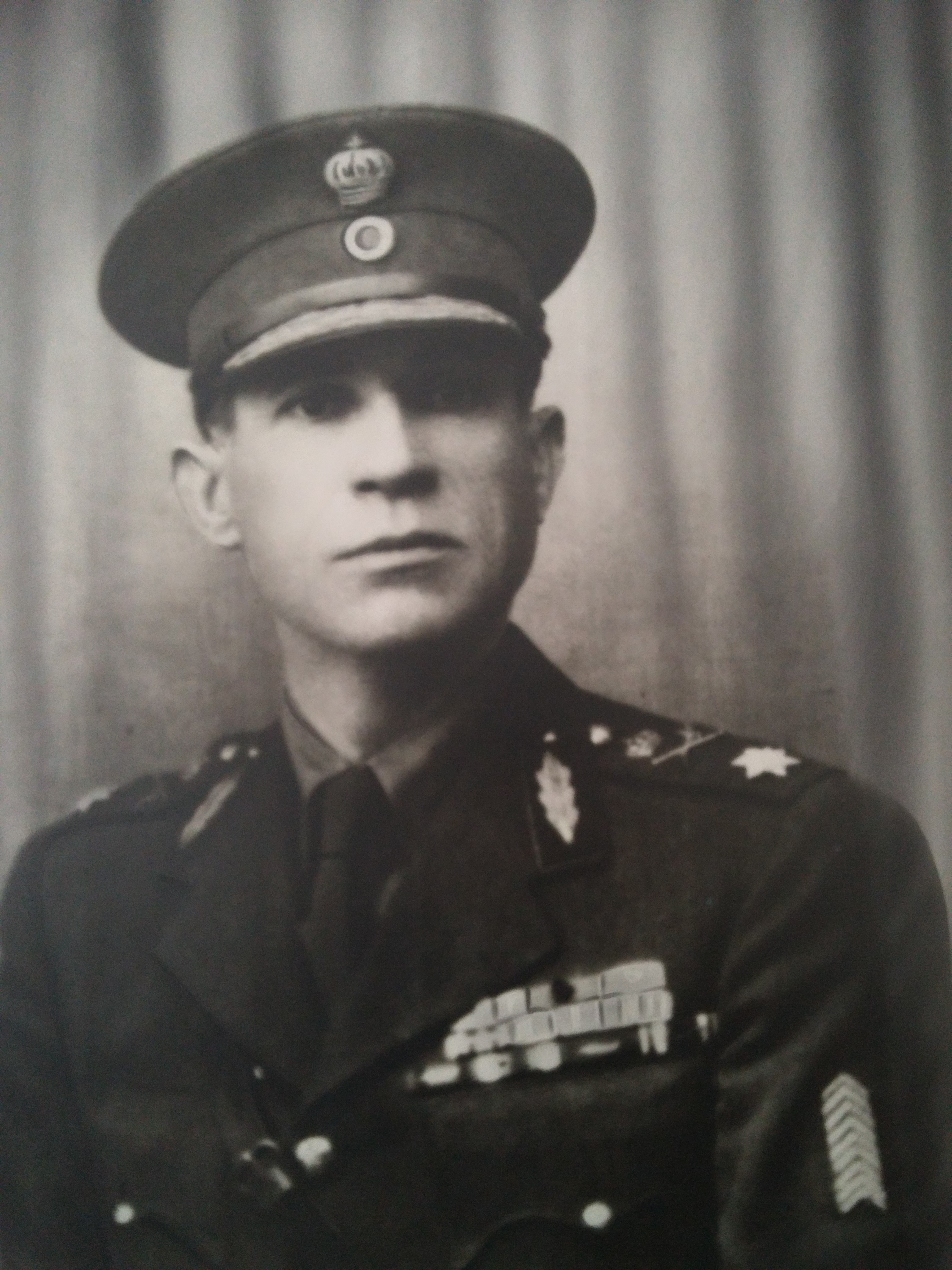 Φωτογραφία προφίλ